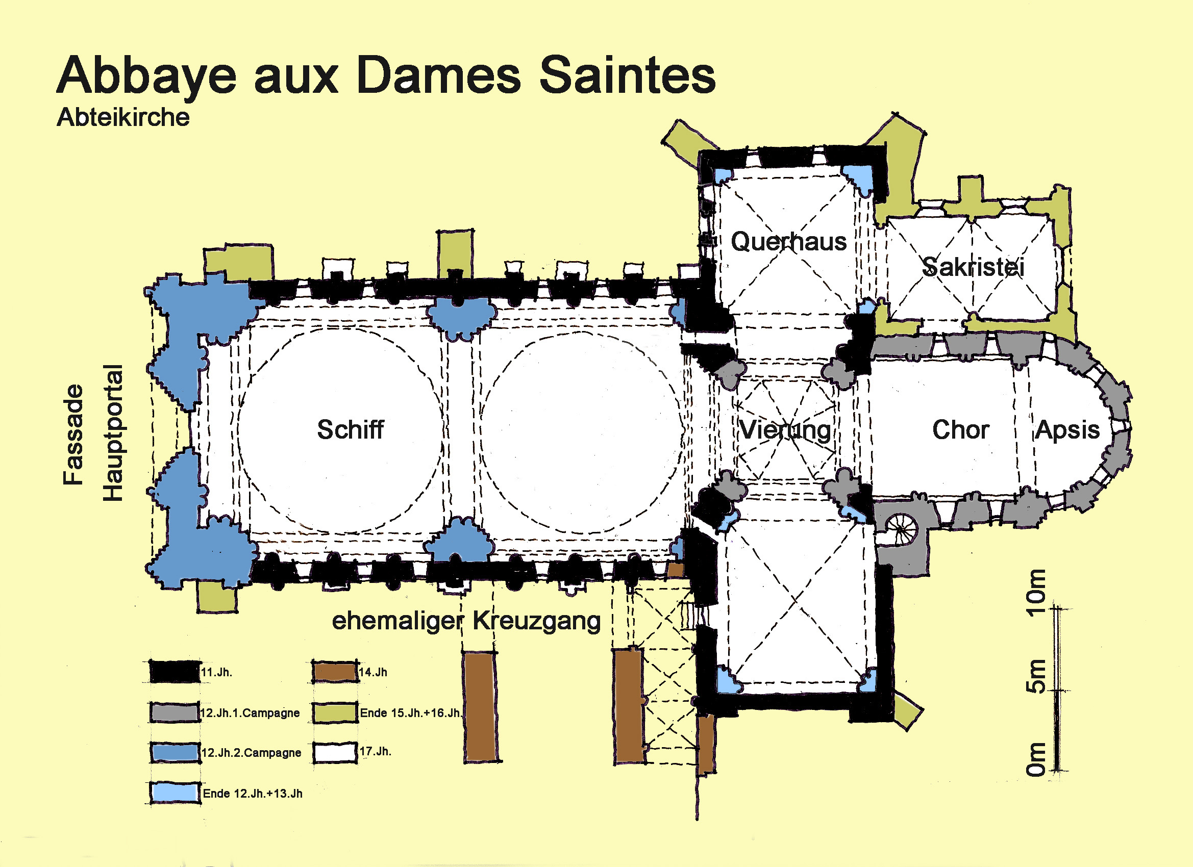 Abbaye_aux_Dames_Saintes, Grundriss, Handskizze